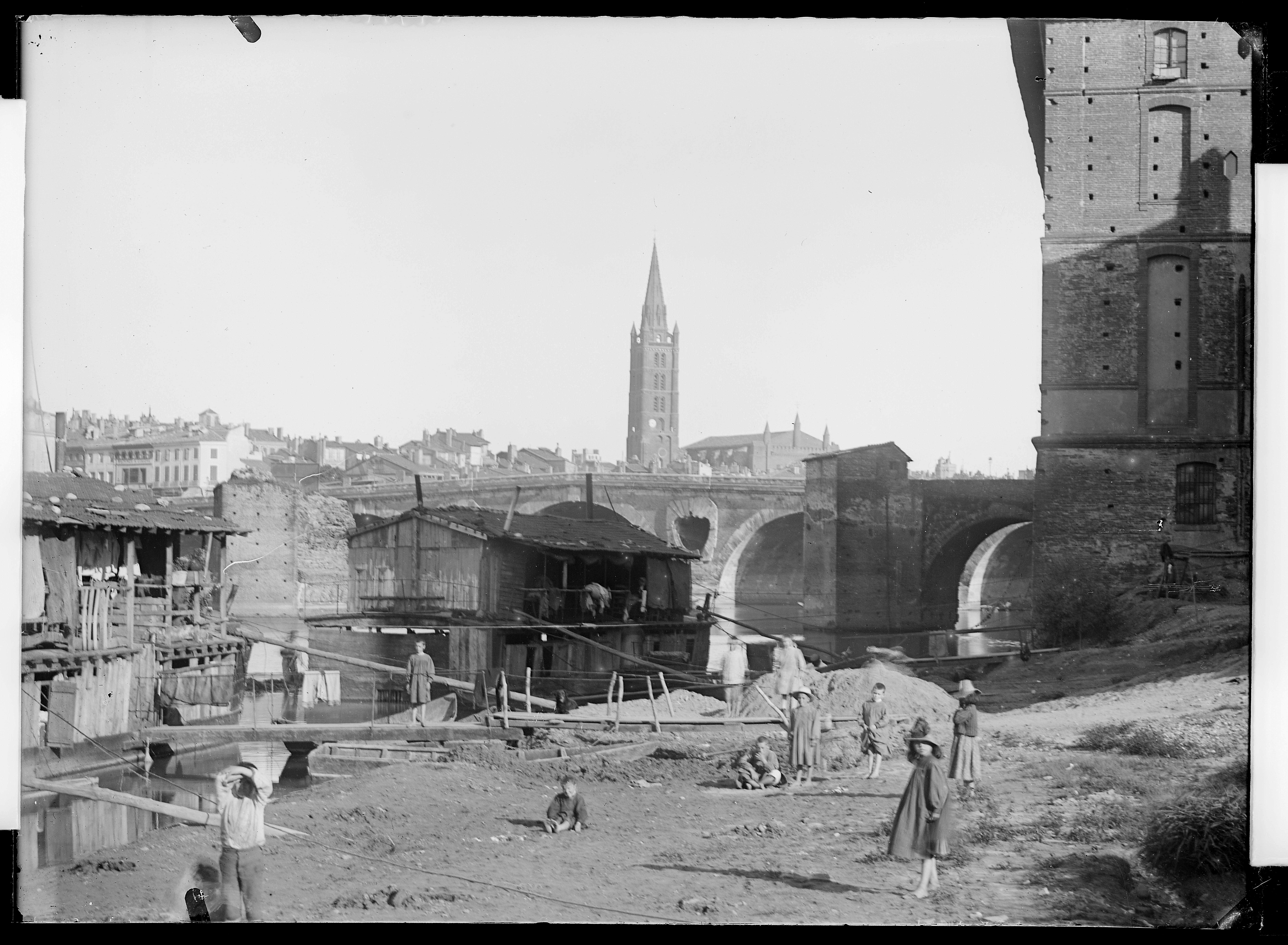 plaque négative au gélatino-bromure d'argent format 13x18cm. inscription manuscrite par Eugène Trutat sur enveloppe : "Toulouse - la Dalbade et pont"